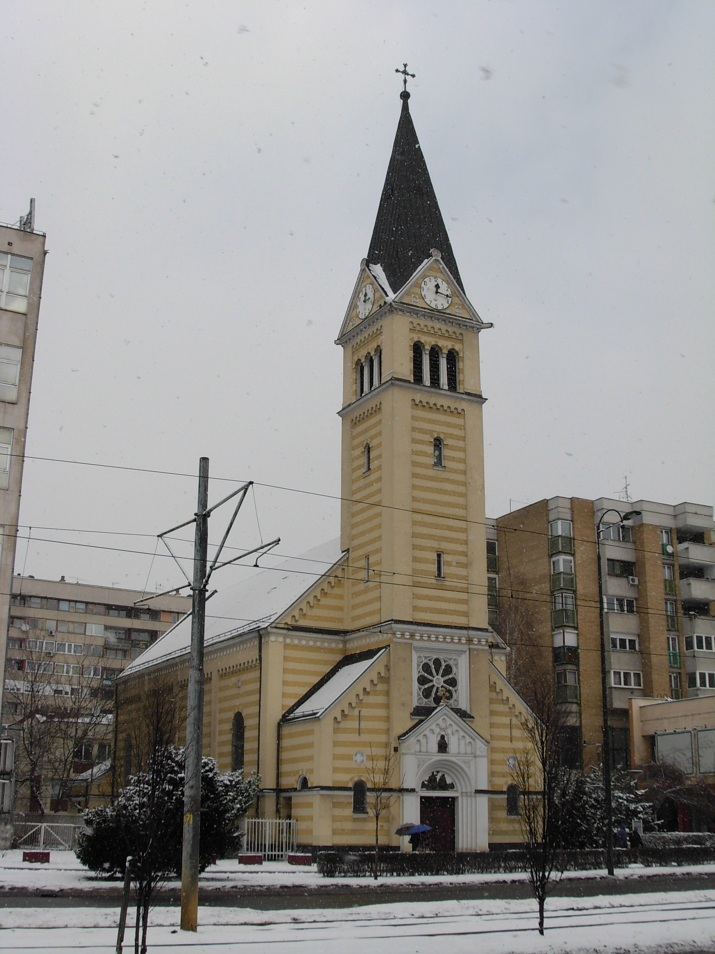 Crkva Presvetog Trojstva u Sarajevu.